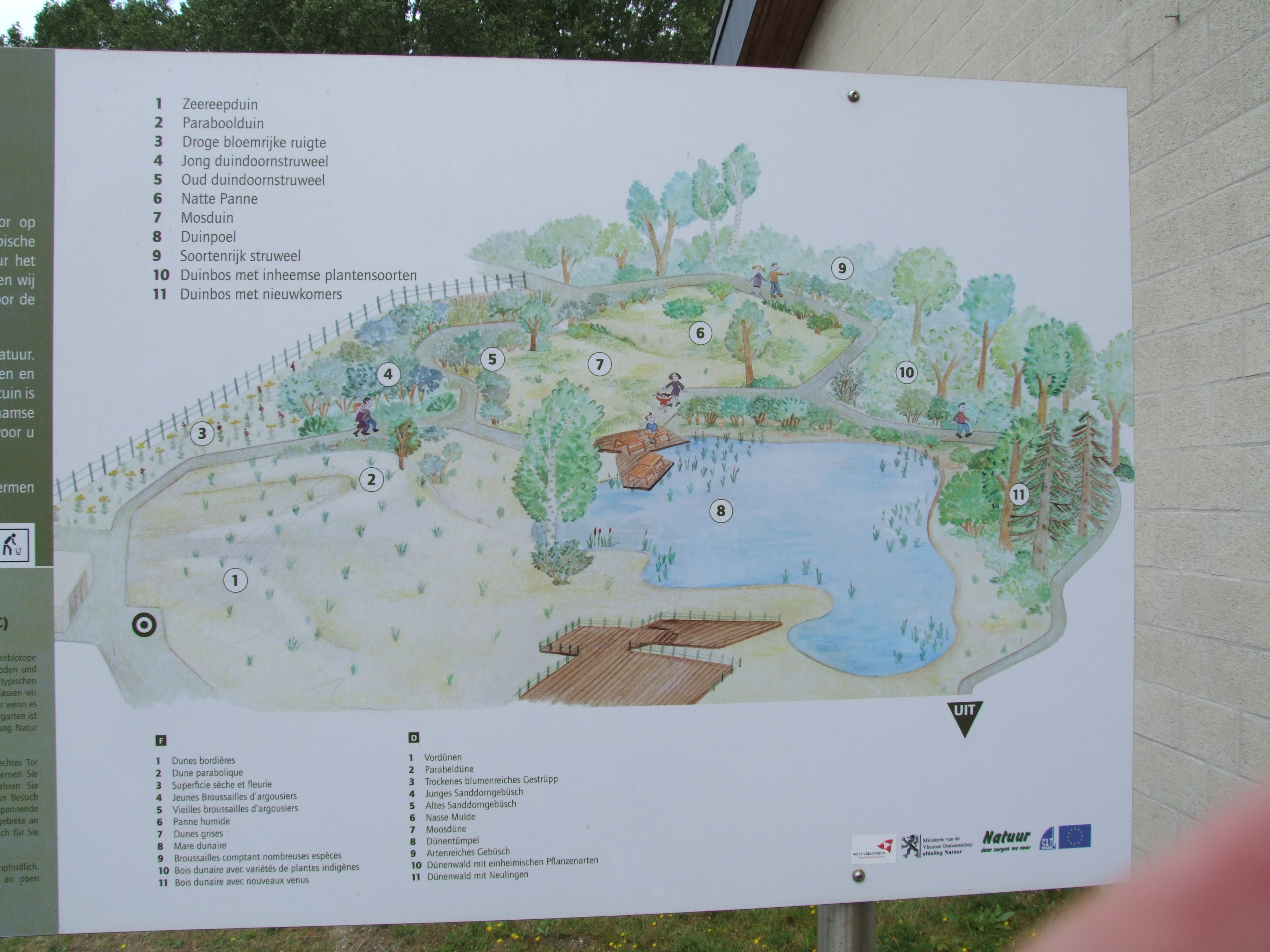 De Nachtegaal, De Panne, Belgien